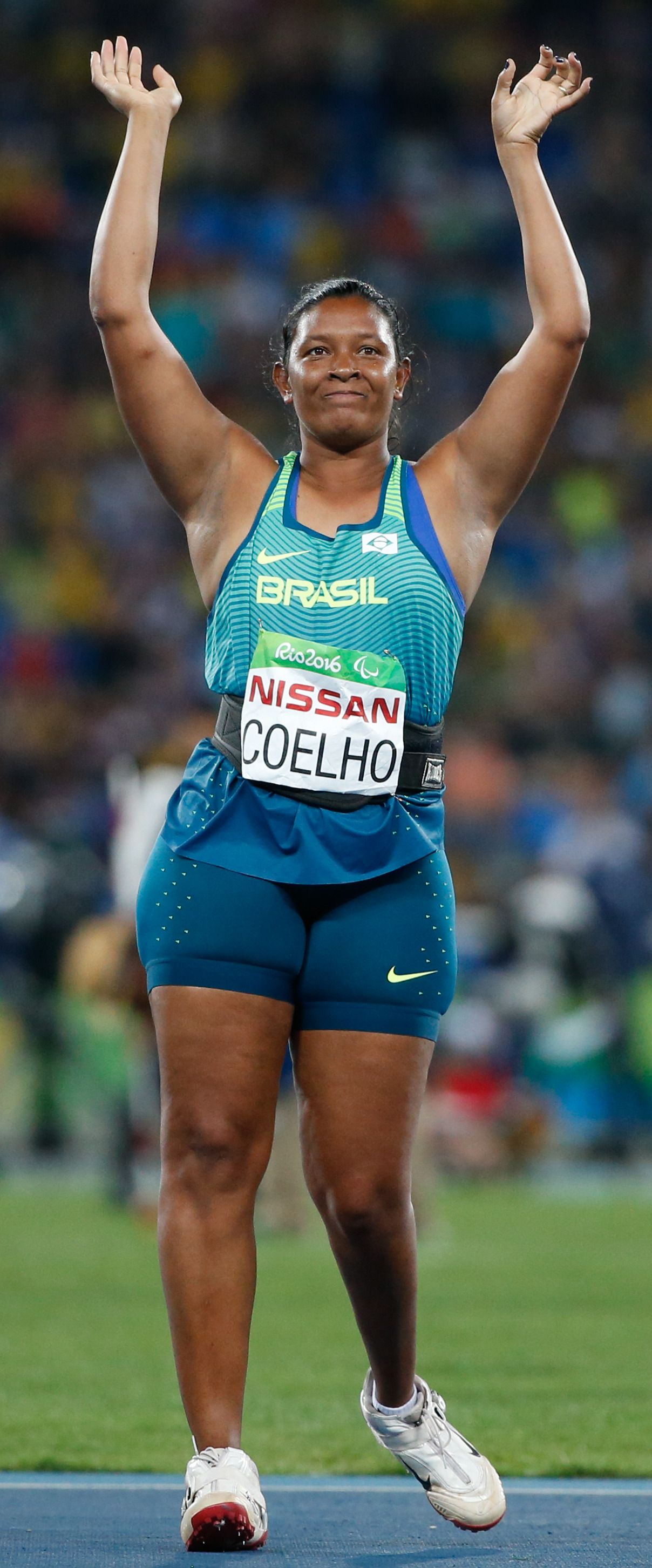 Rio de Janeiro - A brasileira Shirlene Coelho, leva medalha de ouro ao vence o lançamento de dardo F37 do atletismo nos Jogos Paralímpicos Rio 2016, no Estádio Olímpico.